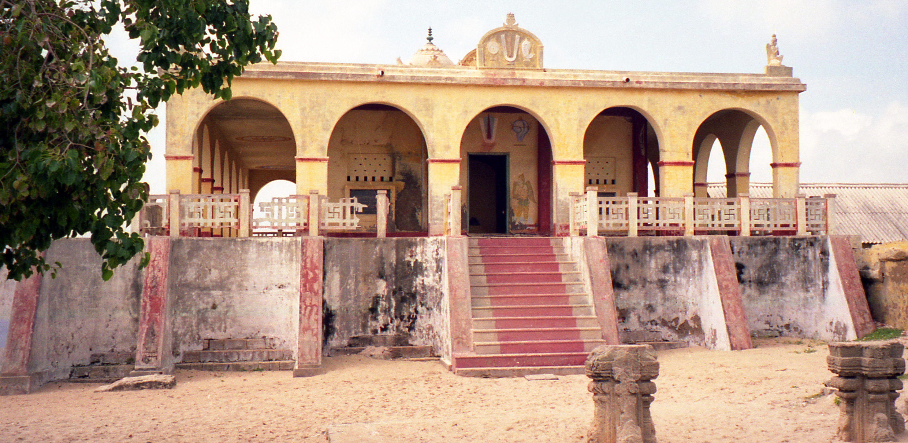 Dhanushkodi, Tamil Nadu, India